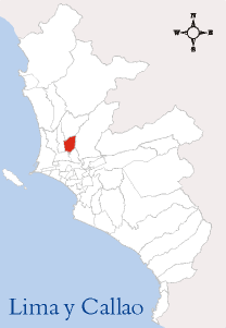 Localización del Distrito de Independencia Imagen elaborada por --Edgardo Reyes 21:05 9 mar, 2005 (CET) Categoría:Mapas del Perú (imagen)